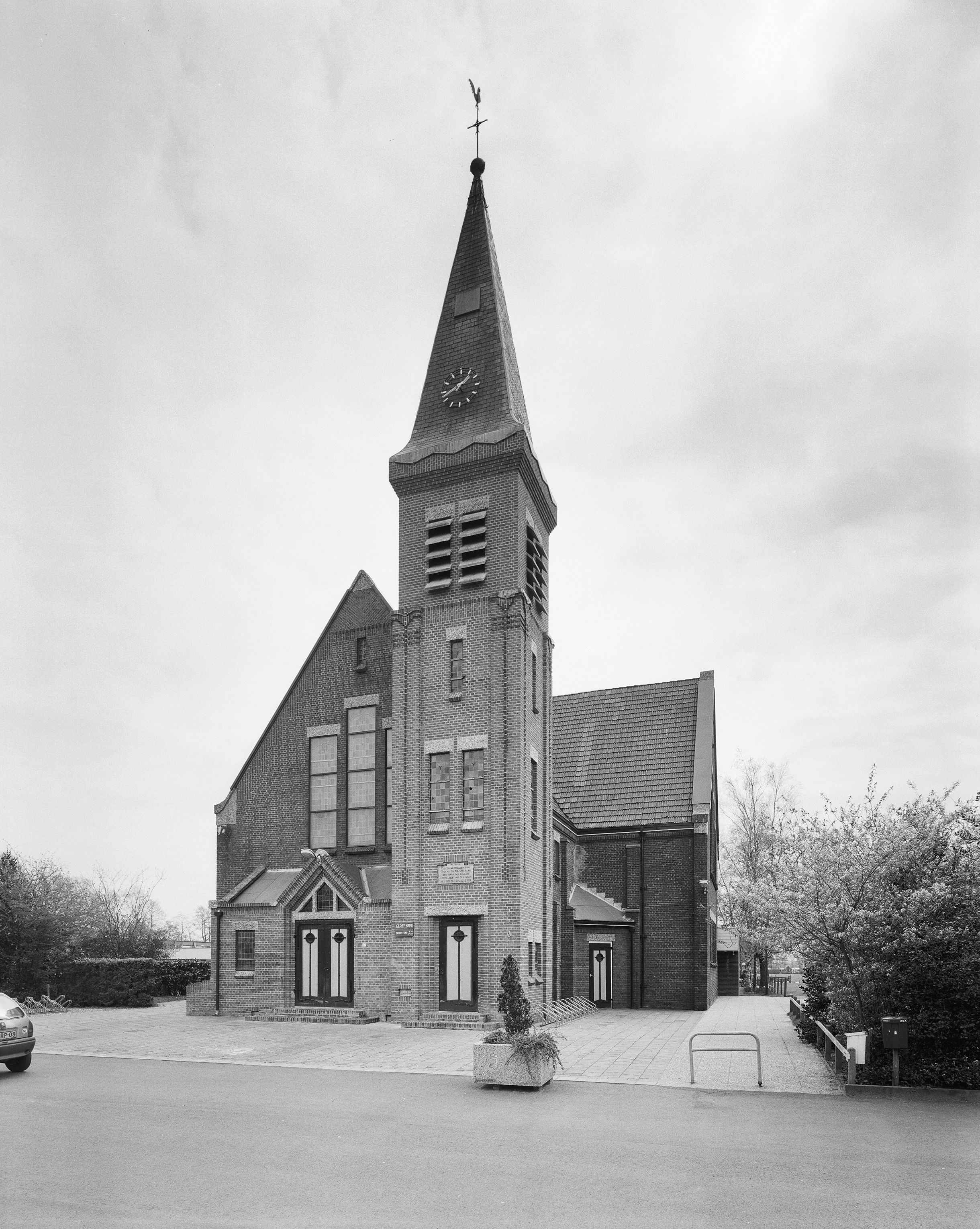 Gereformeerde kerk: Overzicht westgevel met kerktoren (opmerking: Gefotografeerd voor Monumenten In Nederland Friesland, bladzijde 116)